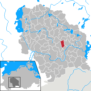 Werder in Mecklenburg-Vorpommern - District Parchim